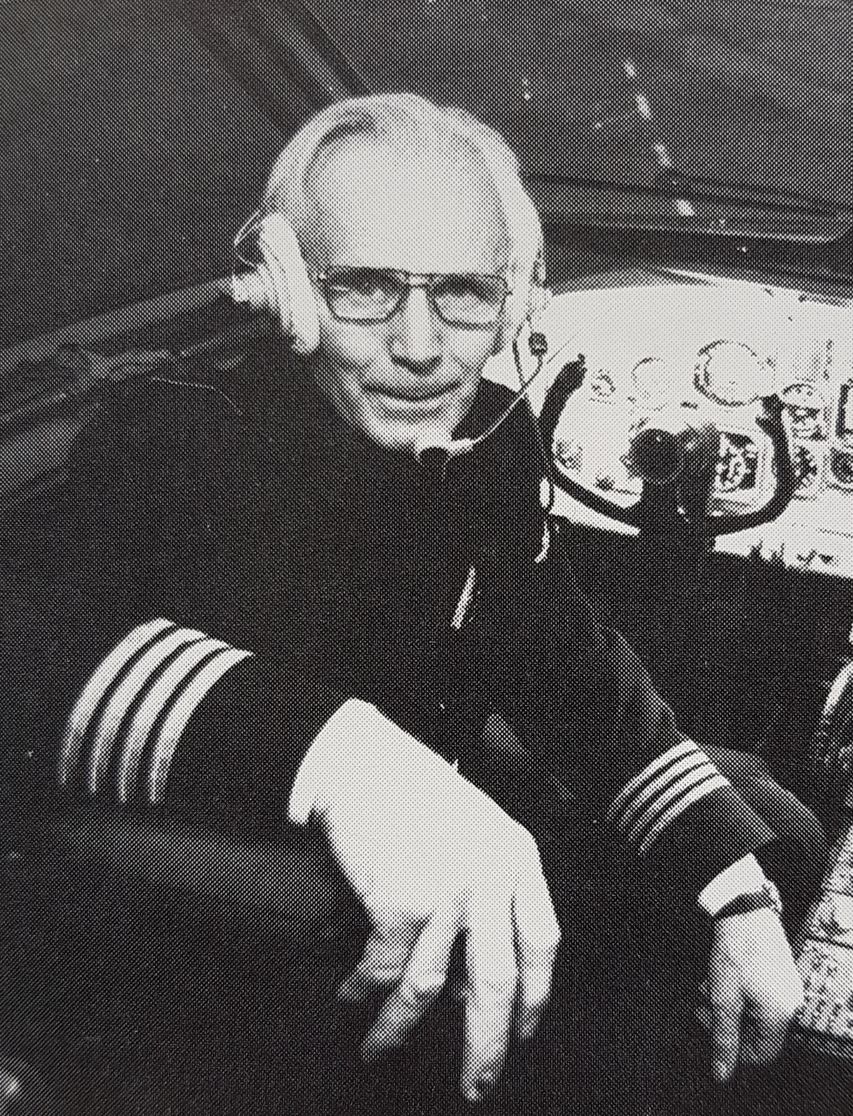 Torvald Andersson